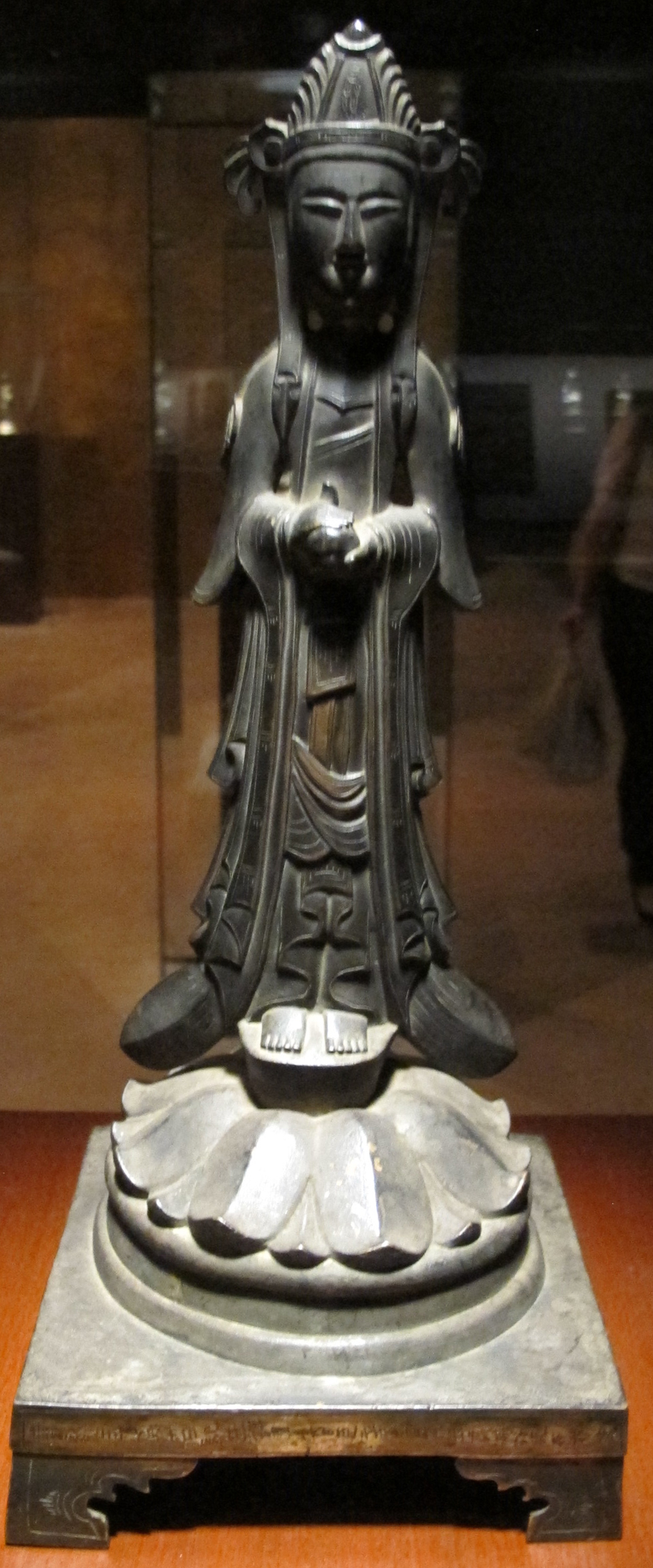 Periodo asuka, avalokitesvara, 631